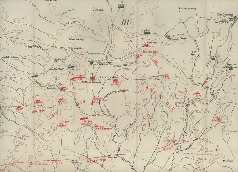 מפה מרשם הקרב על תל חווילפה - 4-נוב-1917